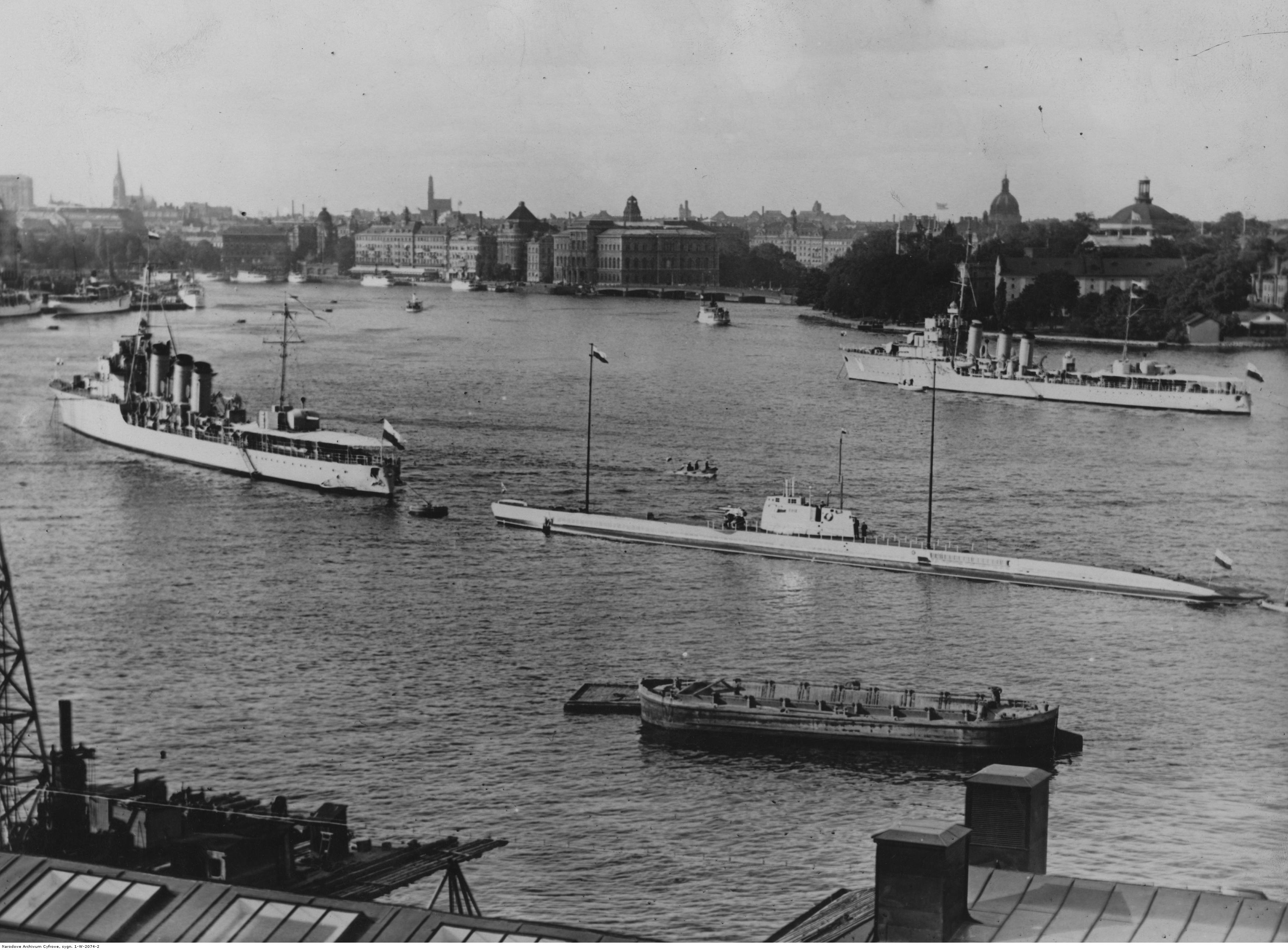 Niszczyciele ORP "Burza", ORP "Wicher" oraz okręt podwodny ORP "Żbik" wpływają do portu w Sztokholmie.